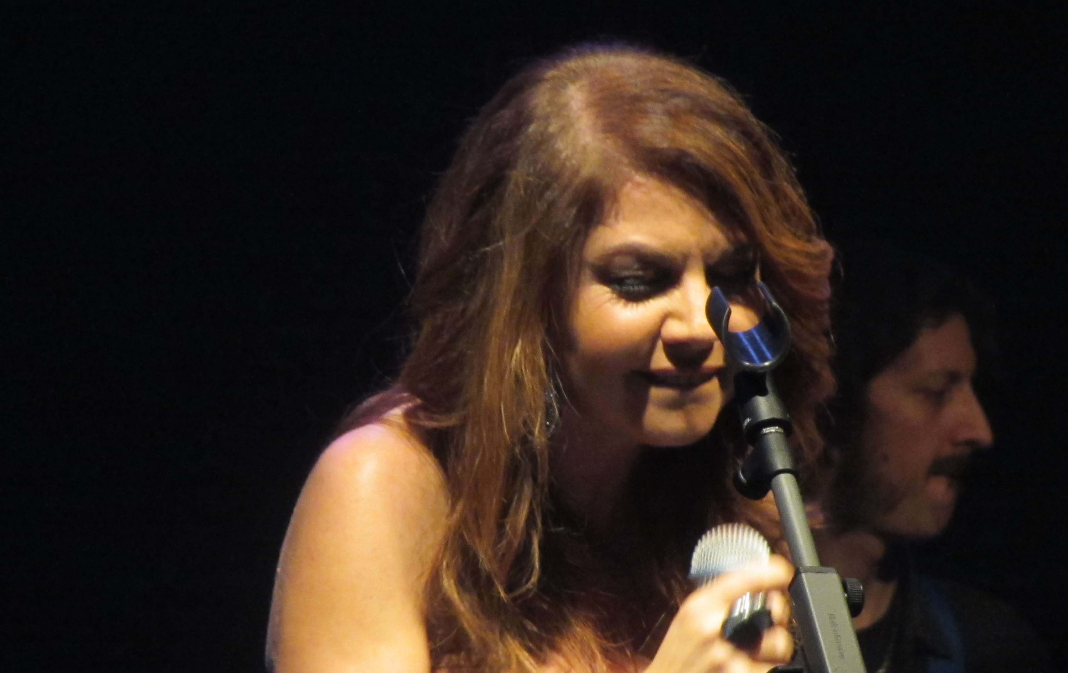 Cristina d'avena live a roma by Paride3.JPG (file)